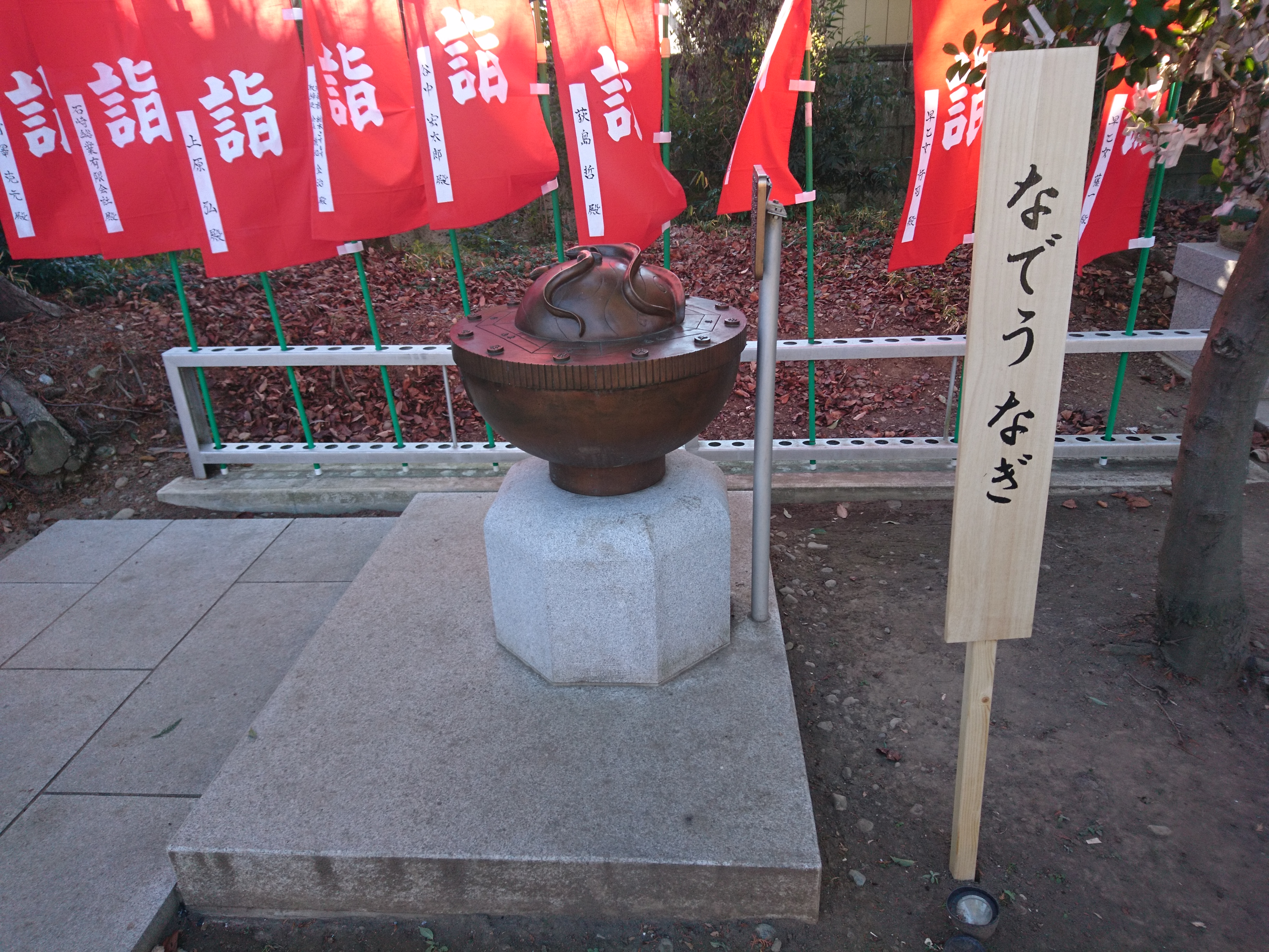 栃木県栃木市にある平柳星宮神社のなでうなぎ。